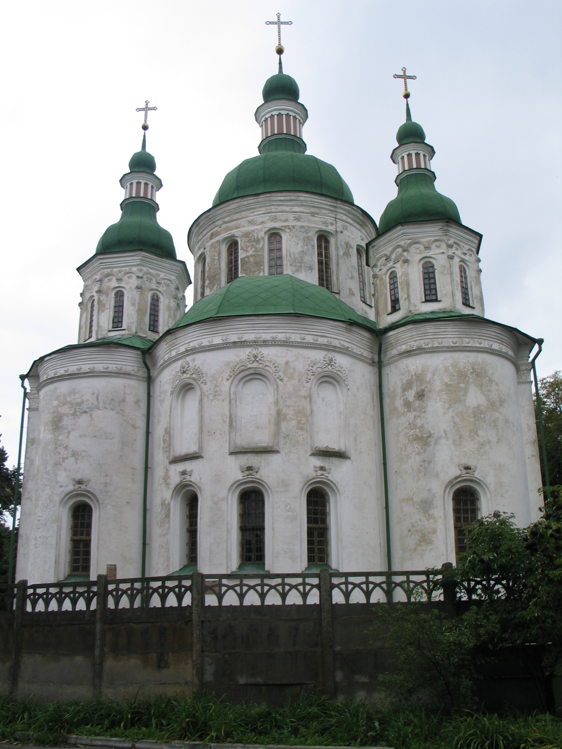 Храм святых Кирилла и Афанасия в Киеве